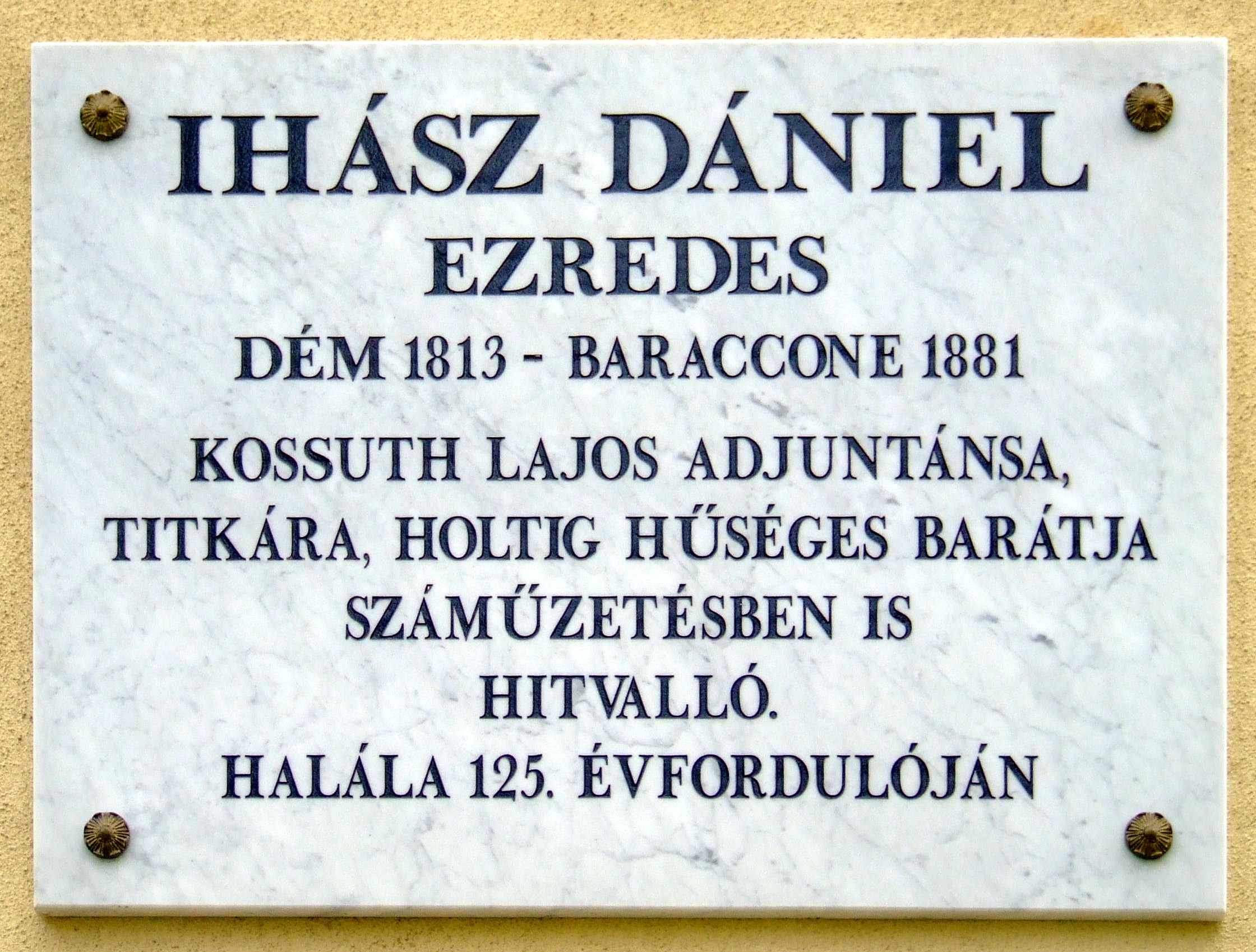 Ihász Dániel-emléktábla a kőbányai reformatus parókia falán